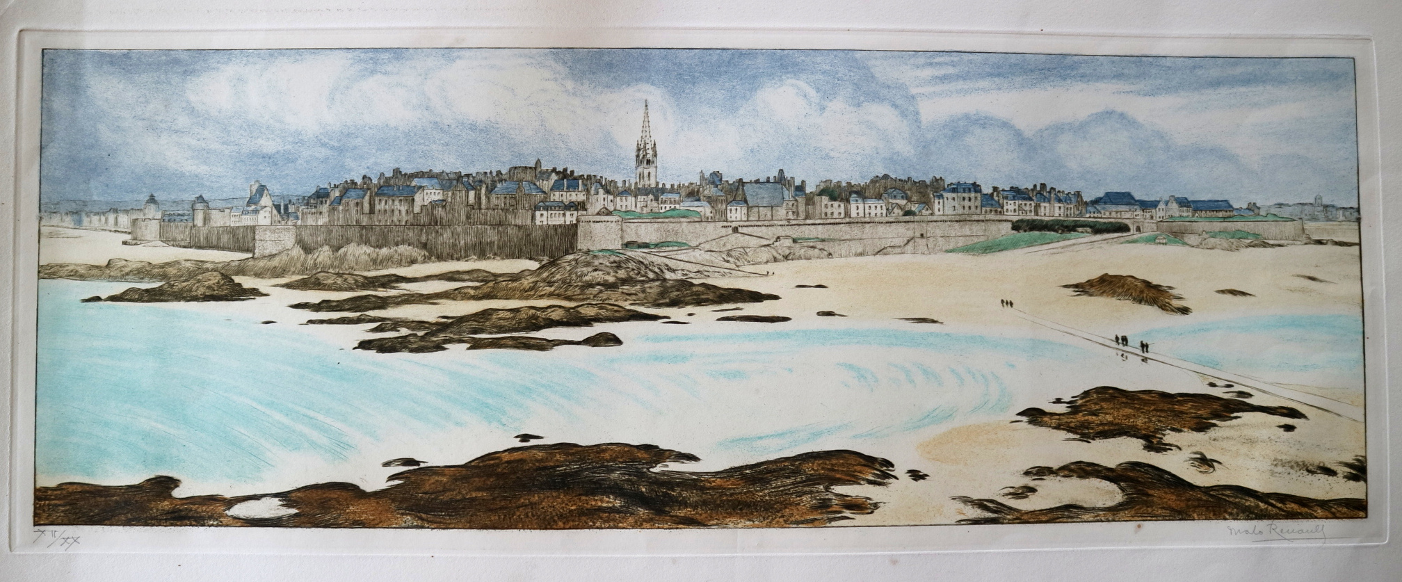 Saint-Malo vu du Grand Bé, eau-forte en couleur